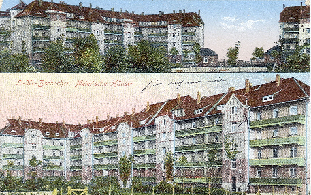 Postkarte, undatiert ( ca.1914 ). Beschriftung: "L.-Kl.Zschocher - Meier´sche Häuser." Handschriftliche Anmerkung: "Hier wohnen wir."